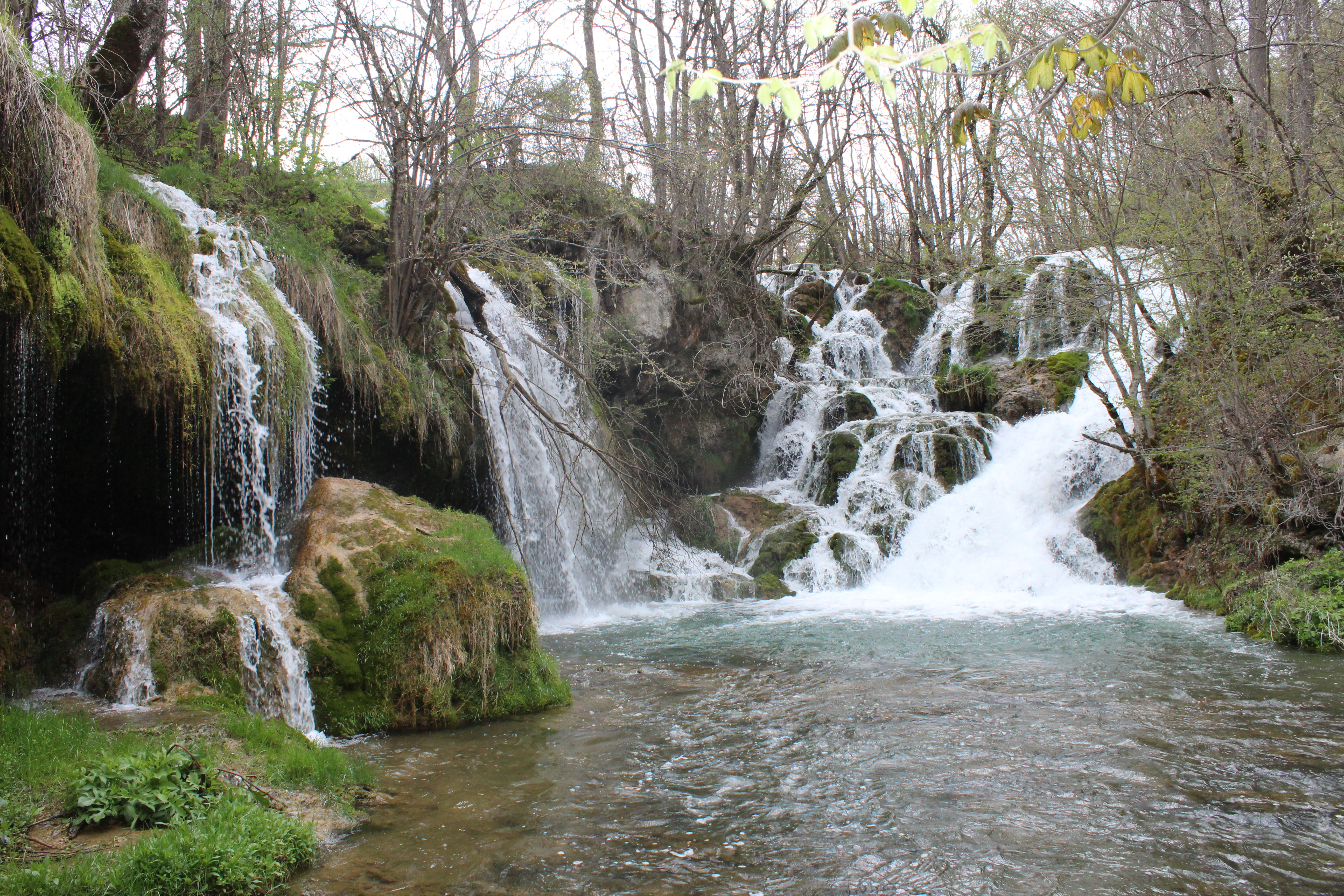 Vodopad reke Rakitnice u Rogatici.